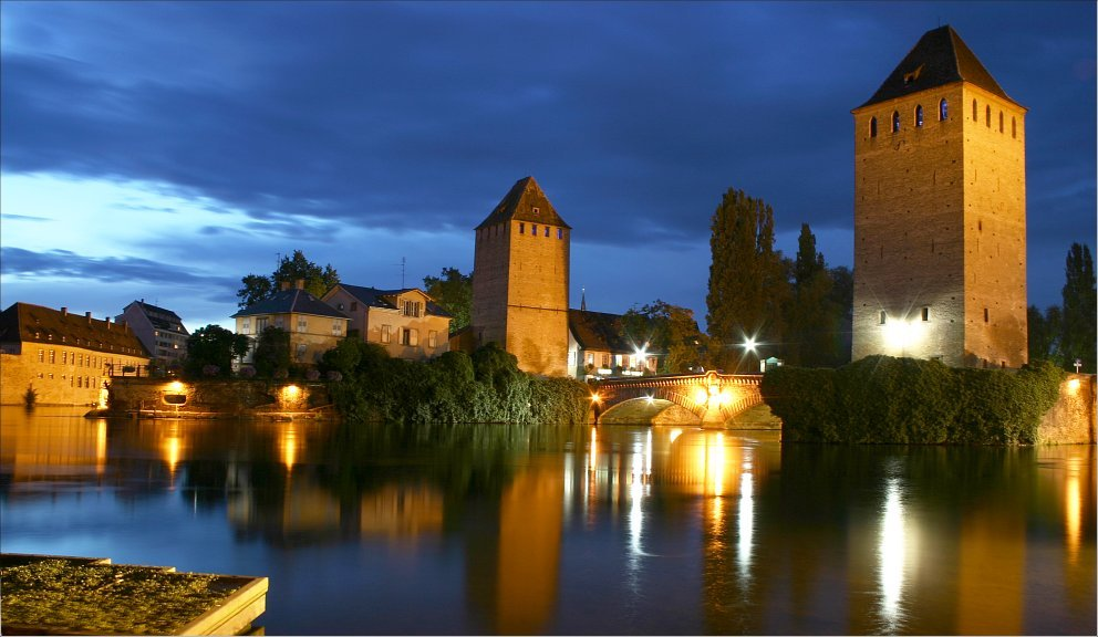 Les ponts couverts, dans le quartier de la petite France, à Strasbourg